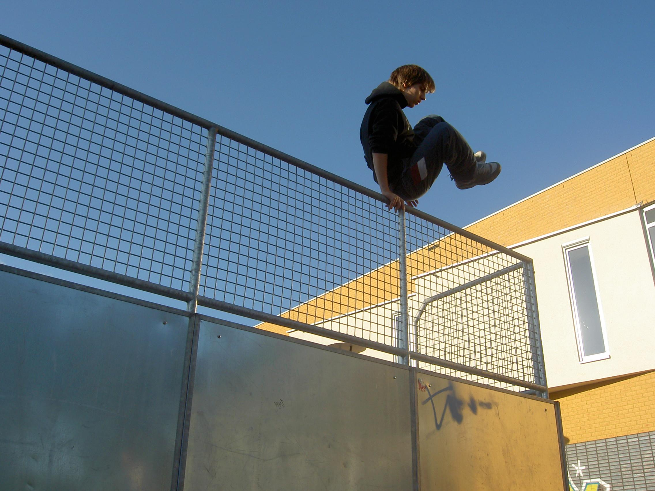 Jordi Lazy Vault